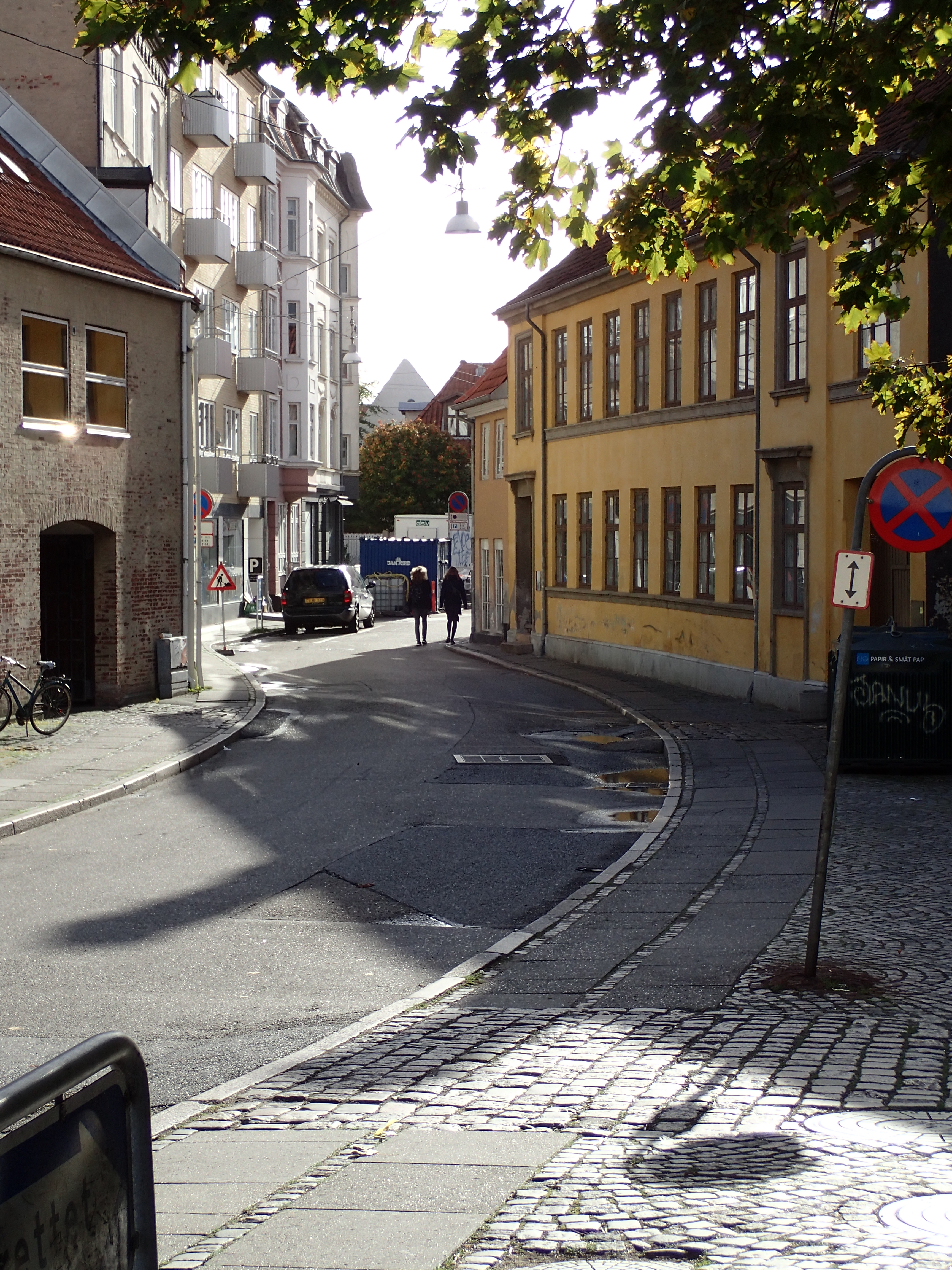 Studsgade i Aarhus. Solskinsdag i oktober.